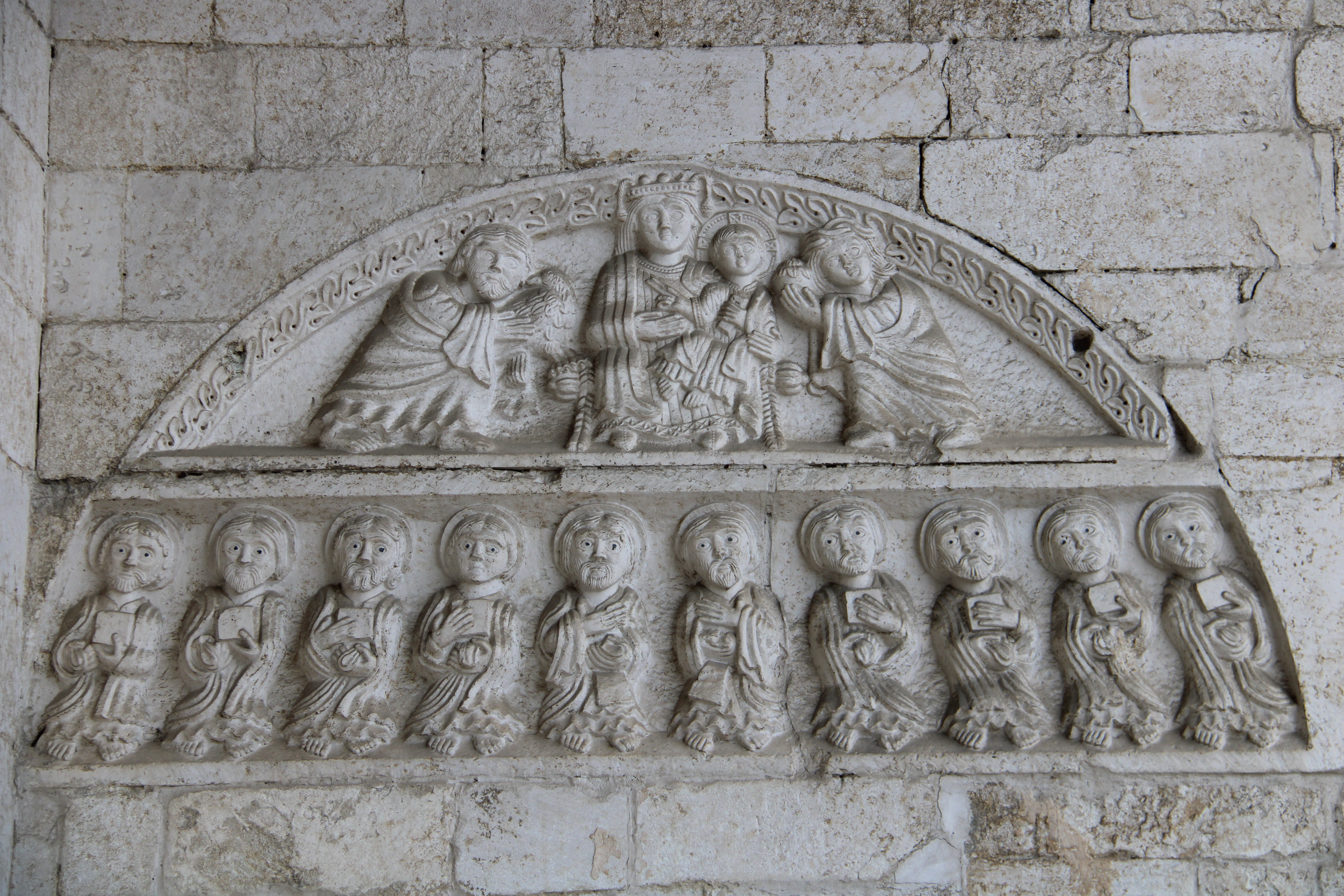 Concattedrale di San Leopardo (Osimo), Madonna con Bambino con gli Apostoli